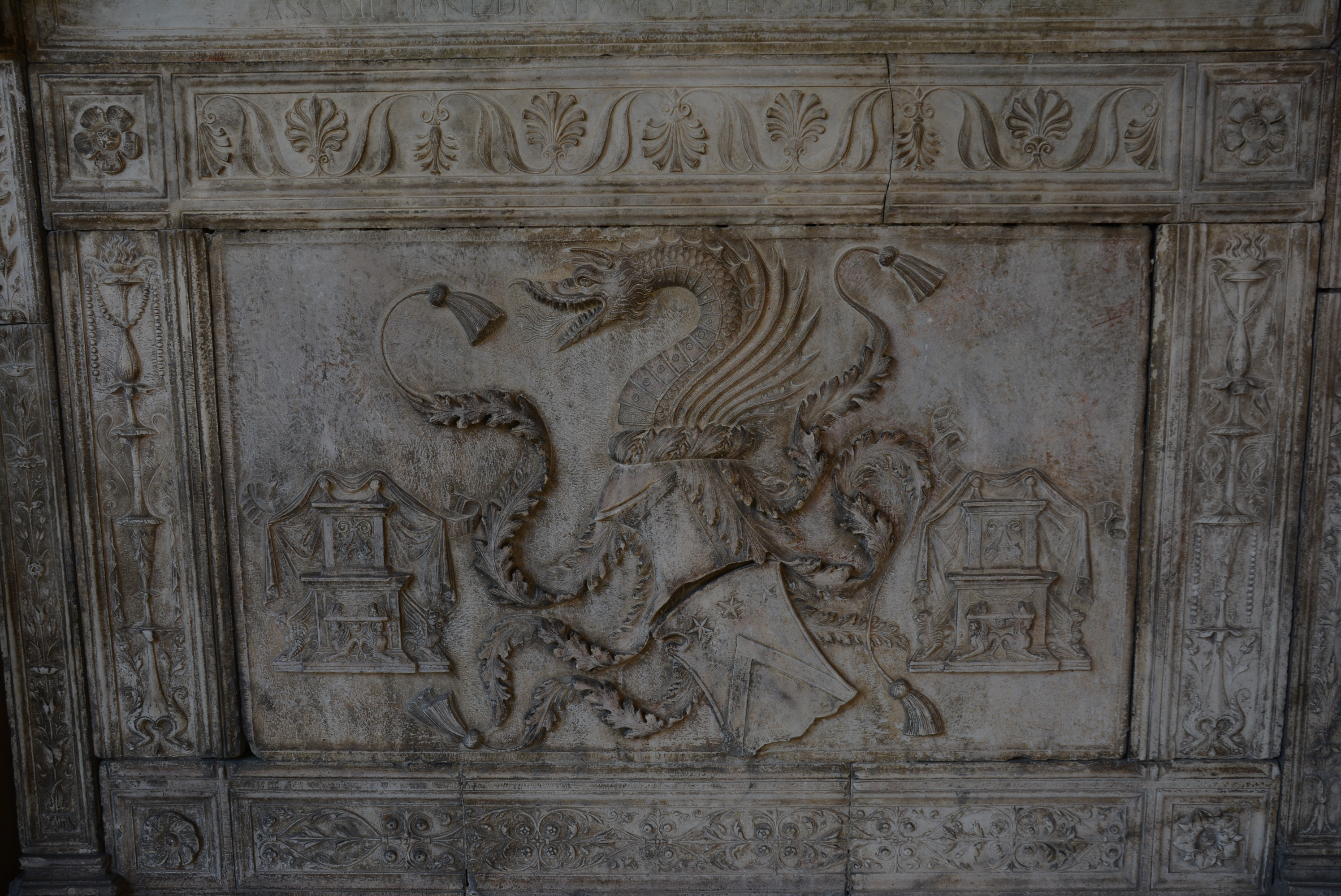 Chiostro piccolo della chiesa di Santa Maria la Nova a Napoli